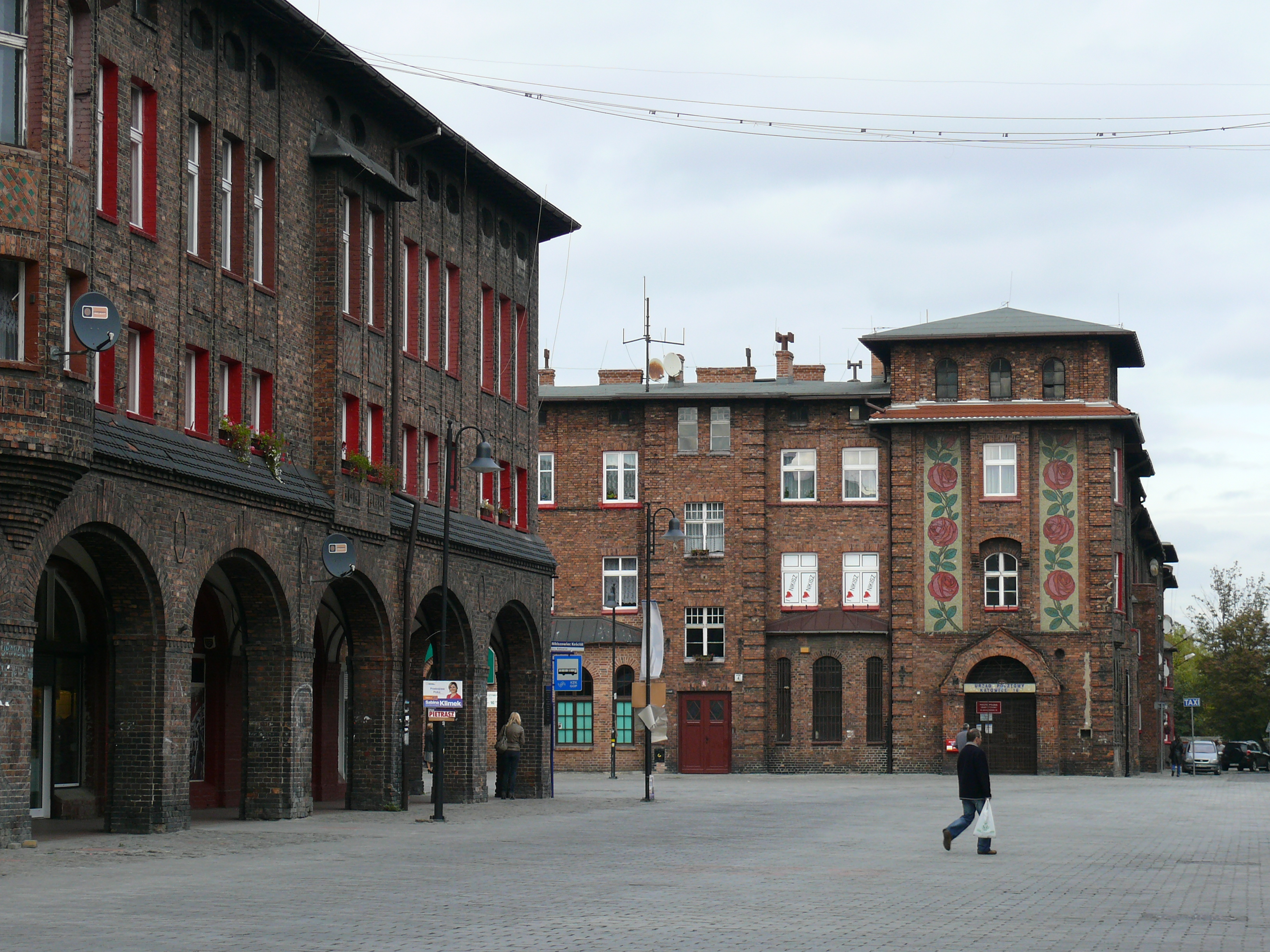 Nikiszowiec